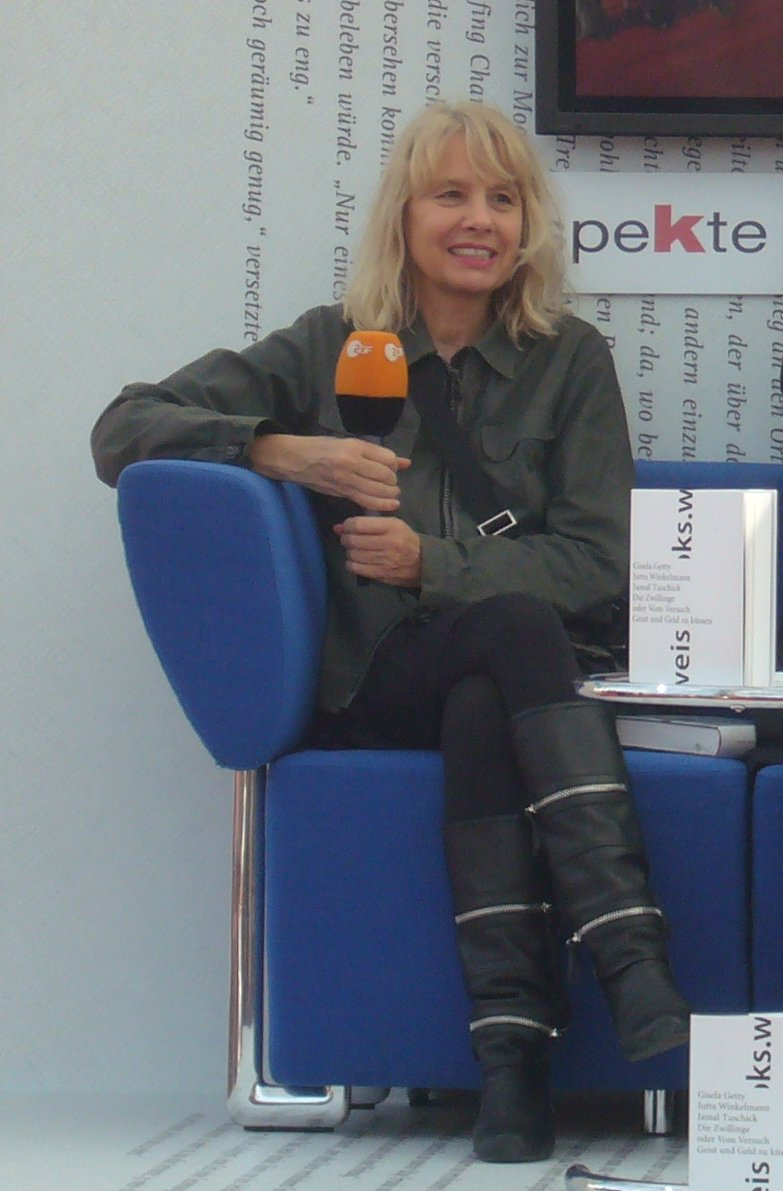 Gisela Getty (das blaue sofa), 15. März 2008.